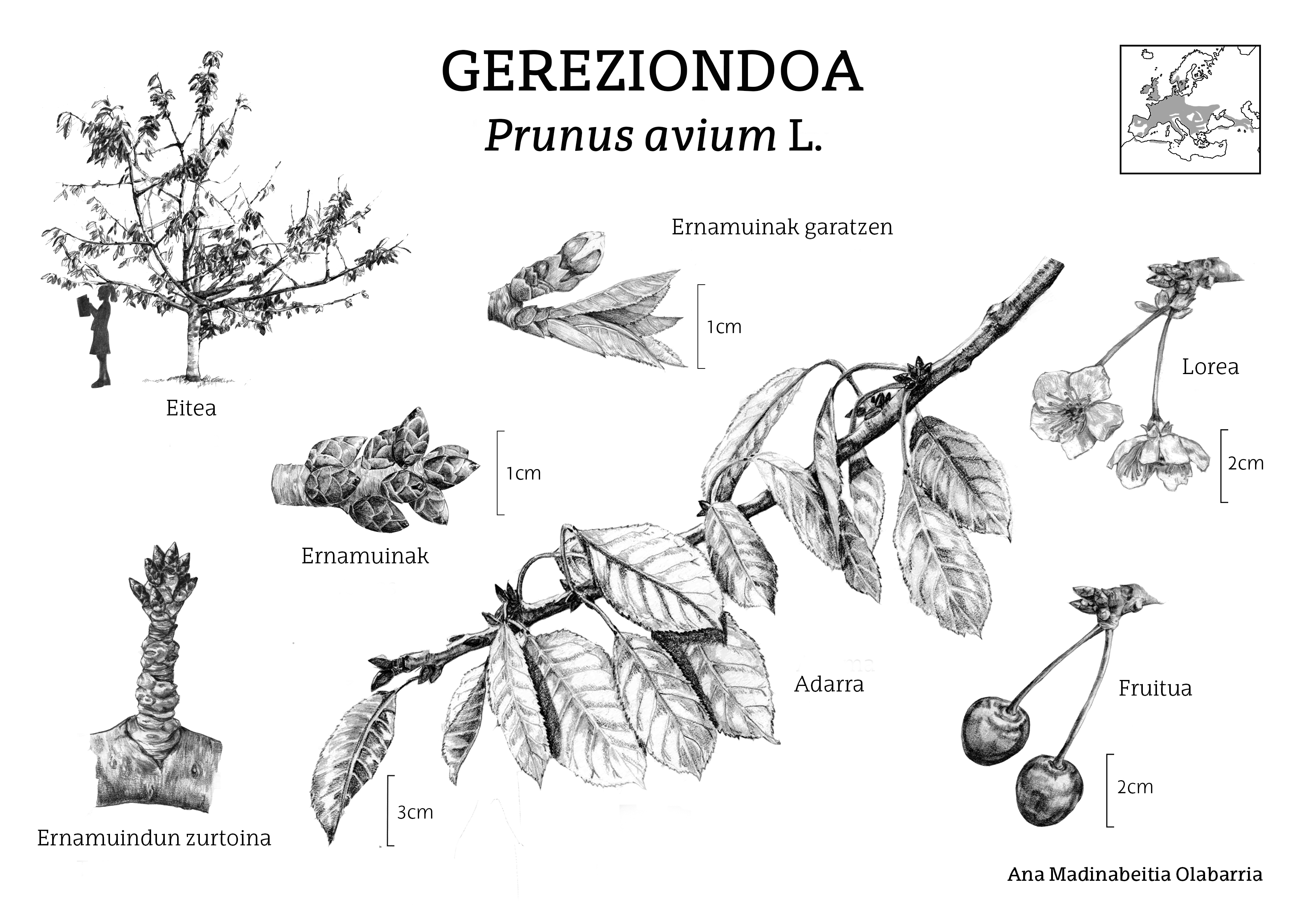 Gereziondoaren lamina botanikoa